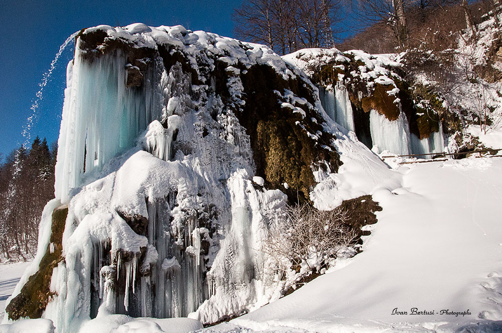 Grotte di Labante (S.I.C.), una vista invernale della cascata This is a photo of a monument which is part of cultural heritage of Italy.